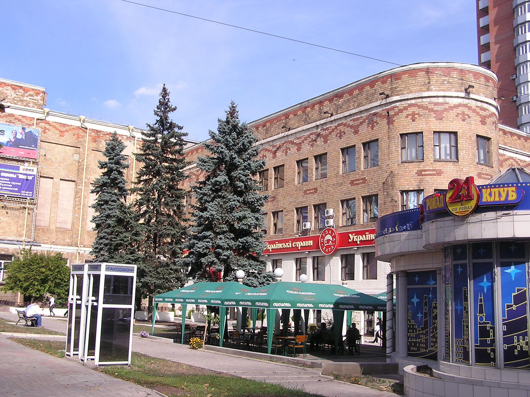 Площадь Ленина в Донецке